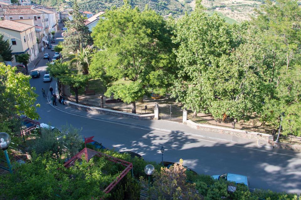 Principale villa comunale